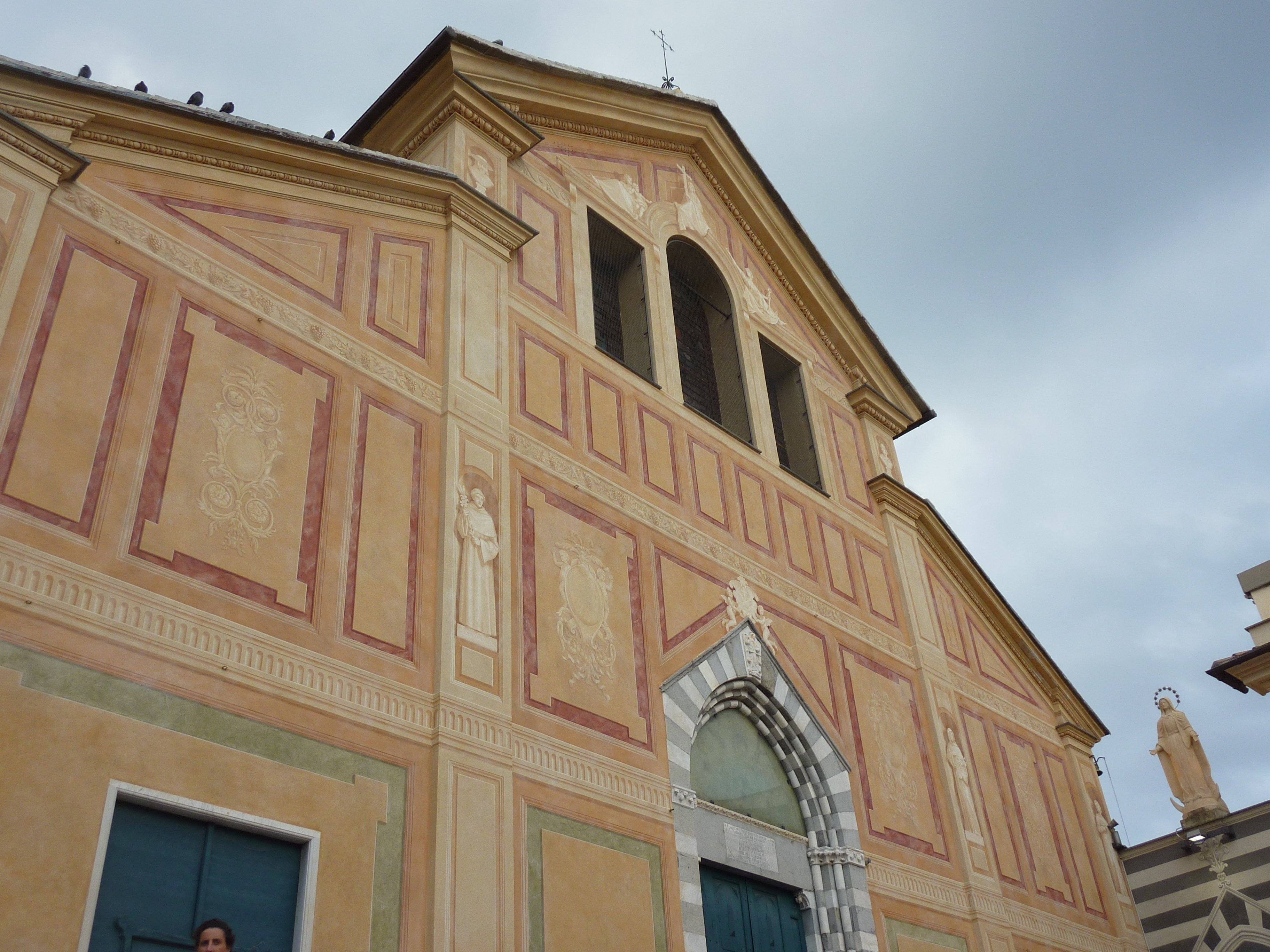 Facciata della chiesa di San Francesco d'Albaro, quartiere di Albaro, Genova, Liguria, Italia